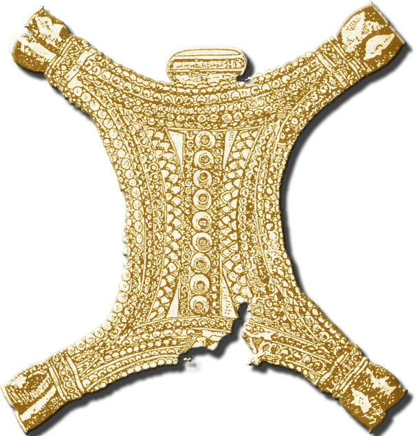 Reproducción del pectoral del Tesoro del Carambolo, Sevilla. autor user:papix